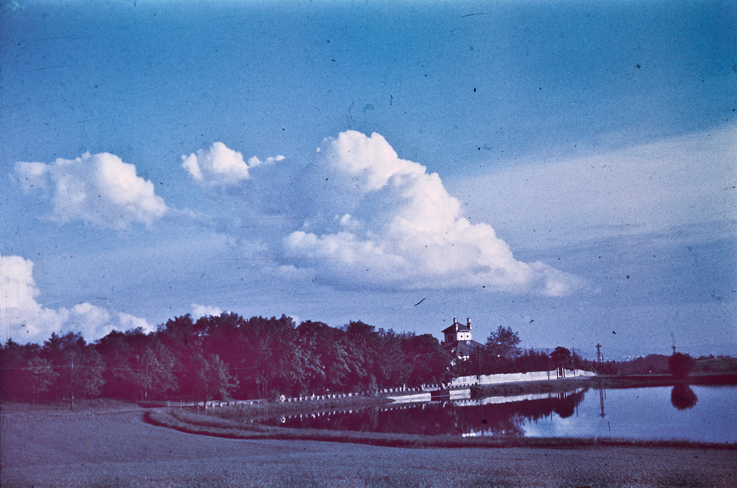 Bildet er hentet fra Arkivverket. Smestaddammen med Villa Bjørnebo i Hoffsveien 65. Fotograf: Thomas Neumann År: 1937 Kamera: Leica Film: Agfa color neu Arkivreferanse: PA1456Ub1_1_3_1 Arkivinstitusjon : Riksarkivet Arkivnavn : Neumann, Thomas Sted : Norge, Oslo, Oslo, Emneord: Landskap Avbildet